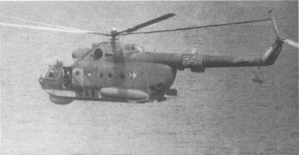 Mi-14BT w barwach służby ratowniczej SAR. Zamiast jednego okna zamontowano reflektor FPP-7. Widoczne okna obserwatora trałów za lewym pływakiem. Cały śmigłowiec malowany jest na kolor granatowy. Pasy na kadłubie i belce ogonowej - pomarańczowe. Numer boczny - czarny z białą obwódką. Łódka kadłuba malowana na kolor błękitny. (opis oryginalny).